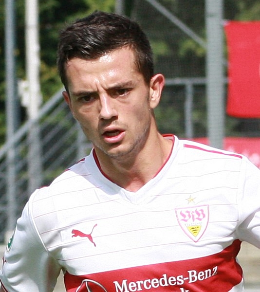 Besar Halimi beim Spiel gegen Rot-Weiss Erfurt